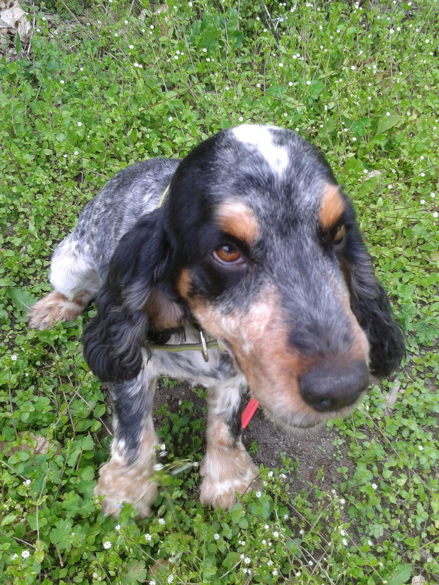 Ybyvtcrvt